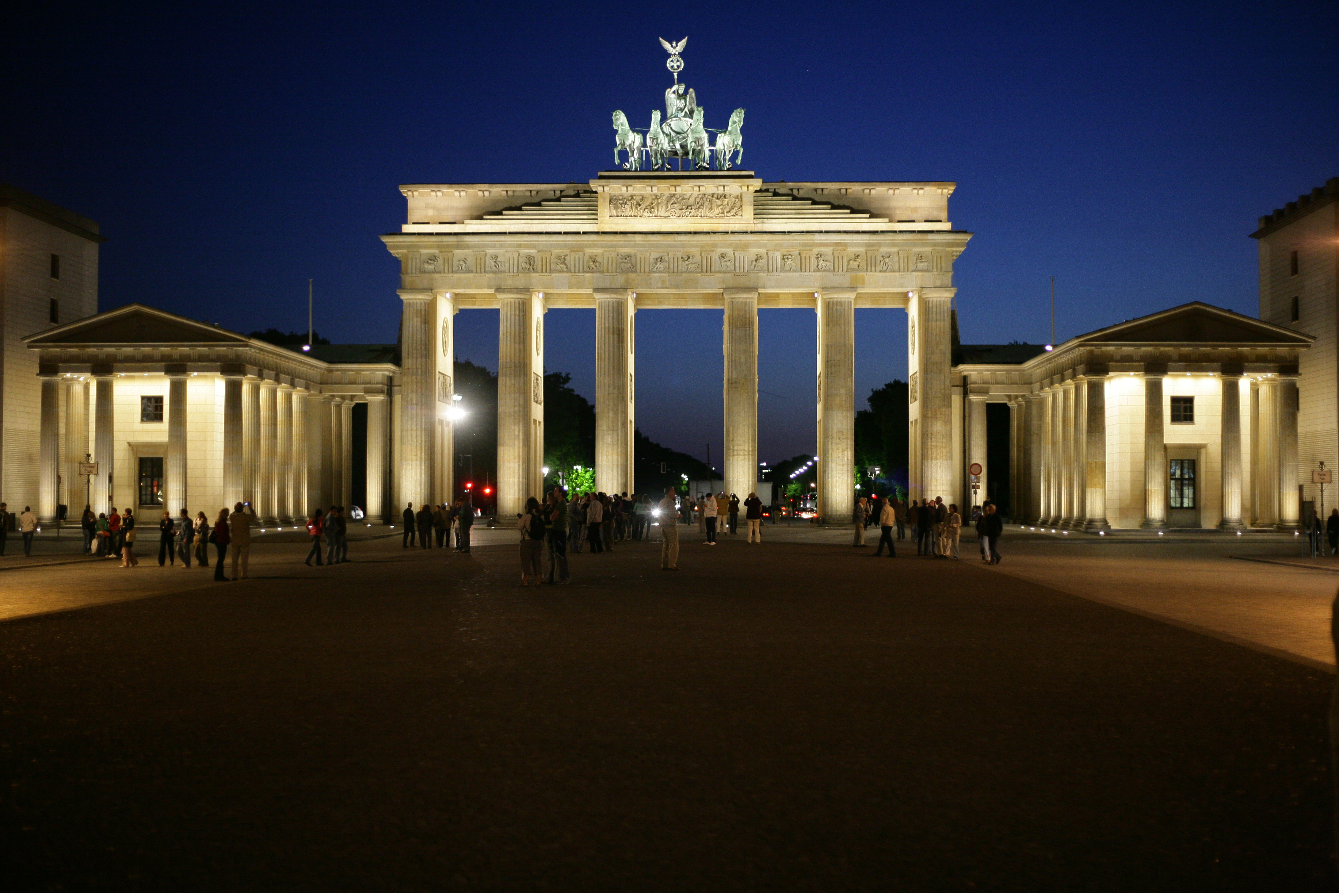 Brandenburger Tor by night. Berlin, Germany